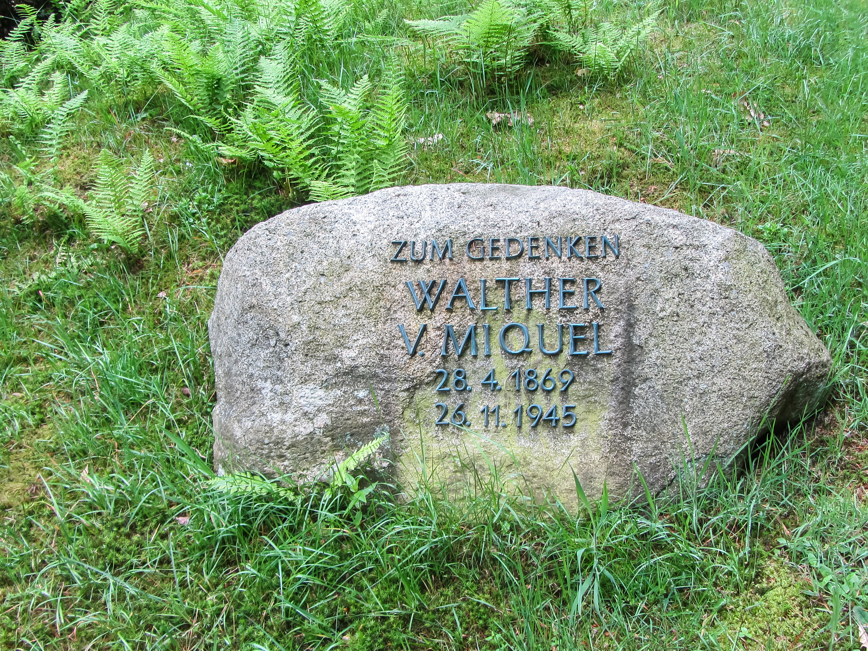 Gedenkstein vor der Begräbnisstätte / Gruft der Fam. von Hanneken, von Miquel, Grafen von Reichenbach in Kollm